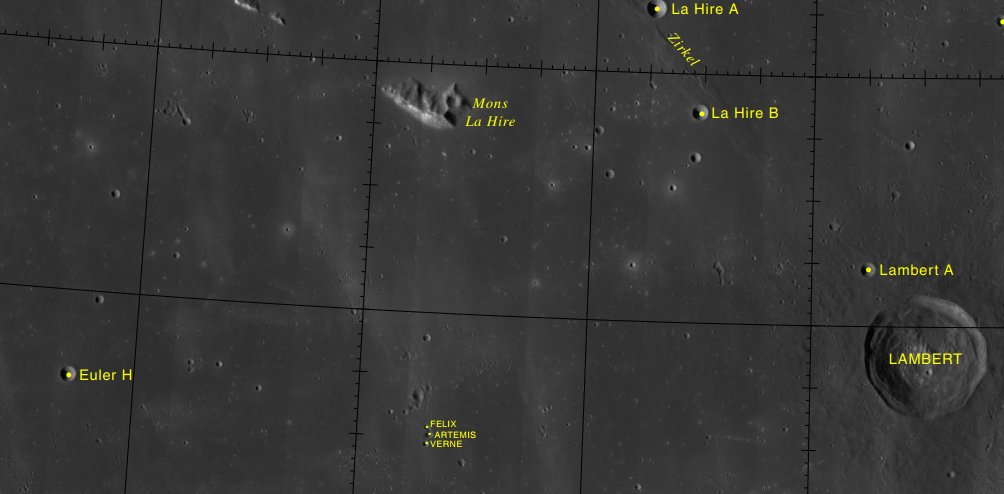 Cráteres lunares al sur del Mons La Hire. (Imagen LRO)